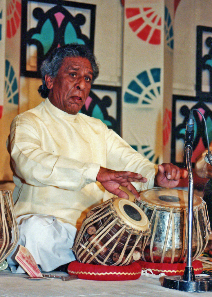 Ustad Shaukat Hussain Khan Alhamra III, Lahore, Pakistan